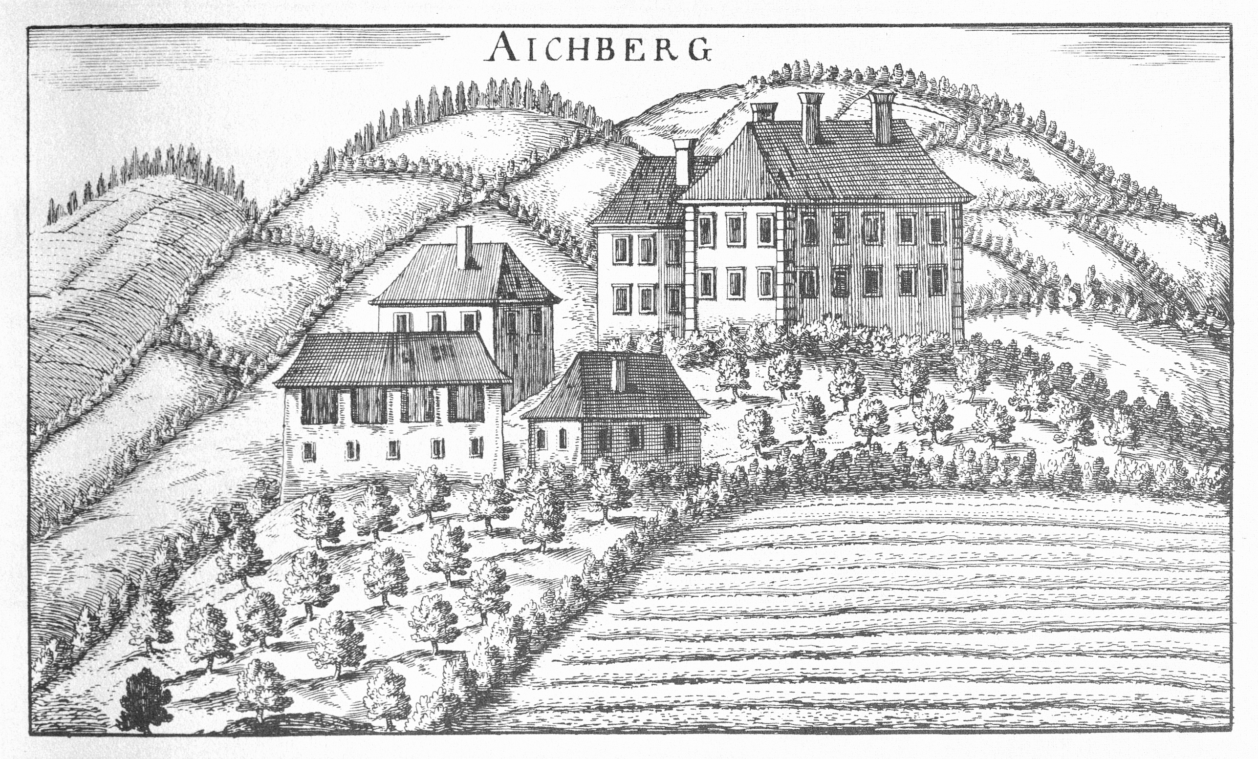 G. M. Vischers Käyserlichen Geographi, Topographia Ducatus Stiriae, Das ist: Eigentliche Delineation / und Abbildung aller Städte / Schlösser / Marcktfleck / Lustgärten / Probsteyen / Stiffter / Clöster und Kirchen / so es sich im Herzogthumb Steyrmarck befinden; Und anjetzo Umb einen billichen Preyß zu finden seynd Bey Johann Bitsch Universitäts Buchhandlern / Auff dem Juden=Platz bey der guldenen Saulen. Graz 1681